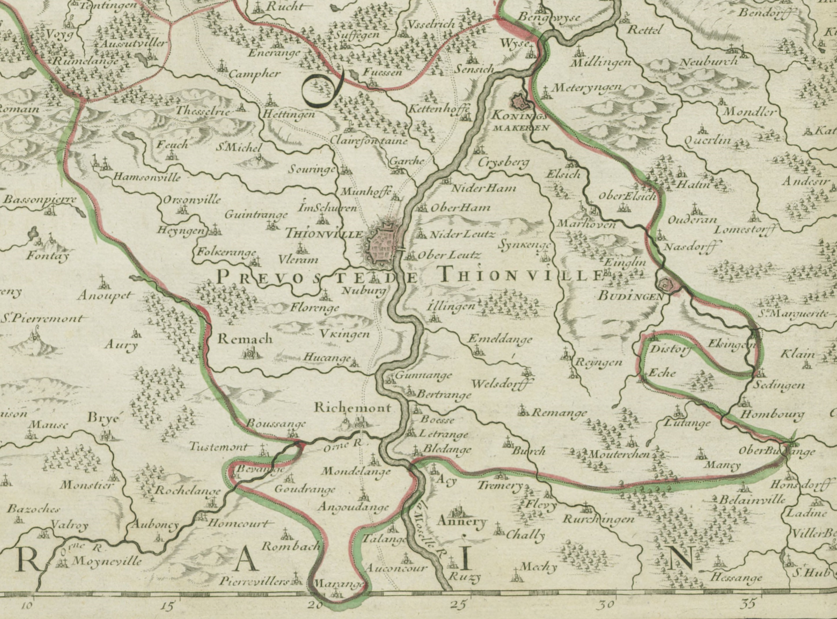 La prévôté de Thionville, délimitée en rouge, reproduite sur une carte de 1705 intitulée : Le Duché de Luxembourg divisé en Quartier Walon et Allemand dans chacun desquels sont diviséz, les Seigneuries, Prevostés et Comtés. Le Duché de Bouillon, le Comté de Namur et le Pays entre Sambre et Meuse.